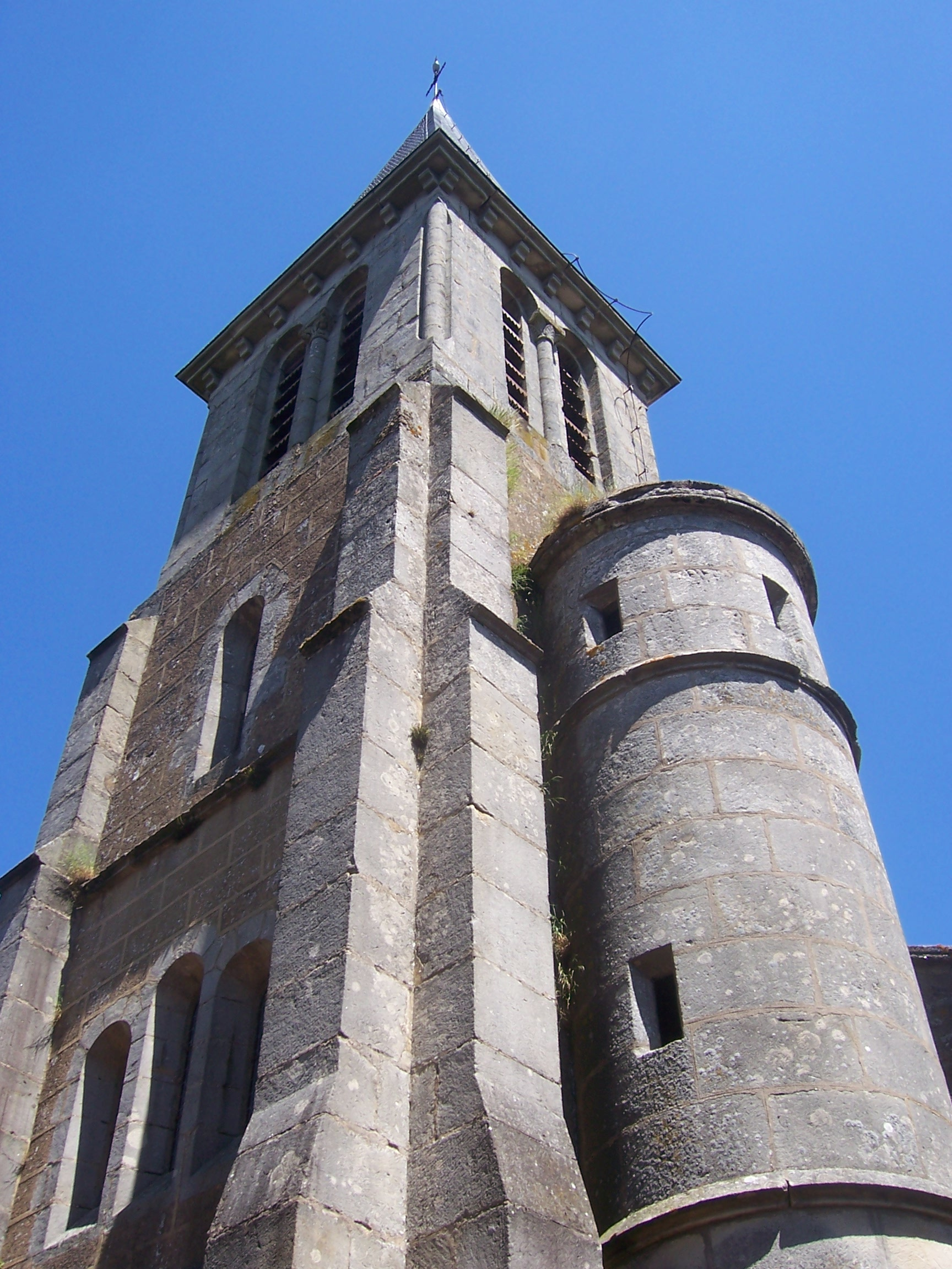 Eglise d'Auxy